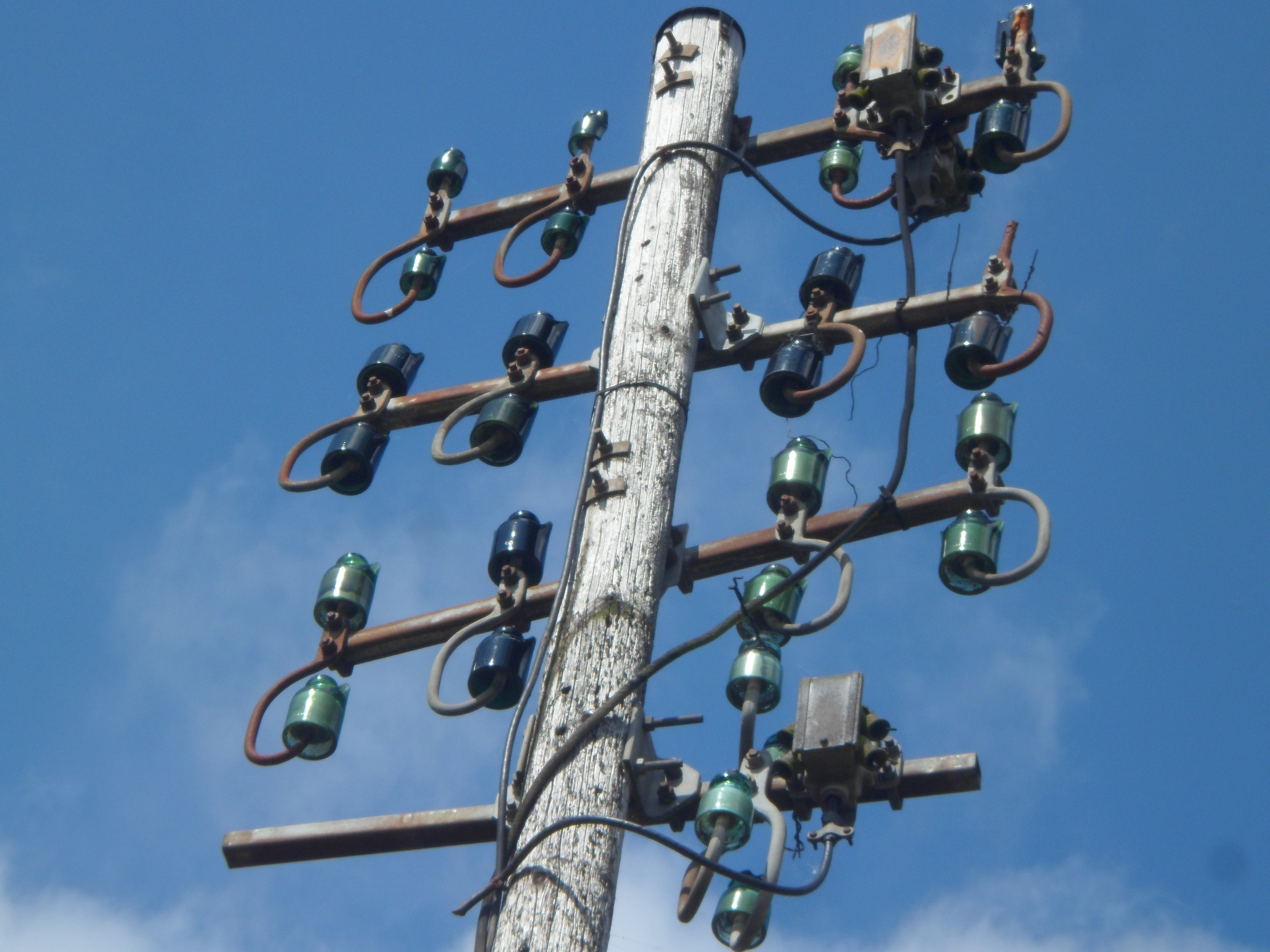 Photographie d'un poteau de lignes téléphoniques et signalisations de la SNCF.